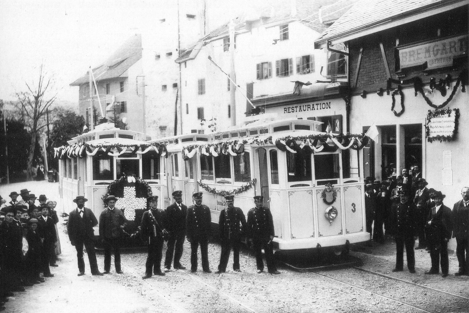 Eröffnungsfahrt der Bremgarten-Dietikon-Bahn am 30. April 1902.